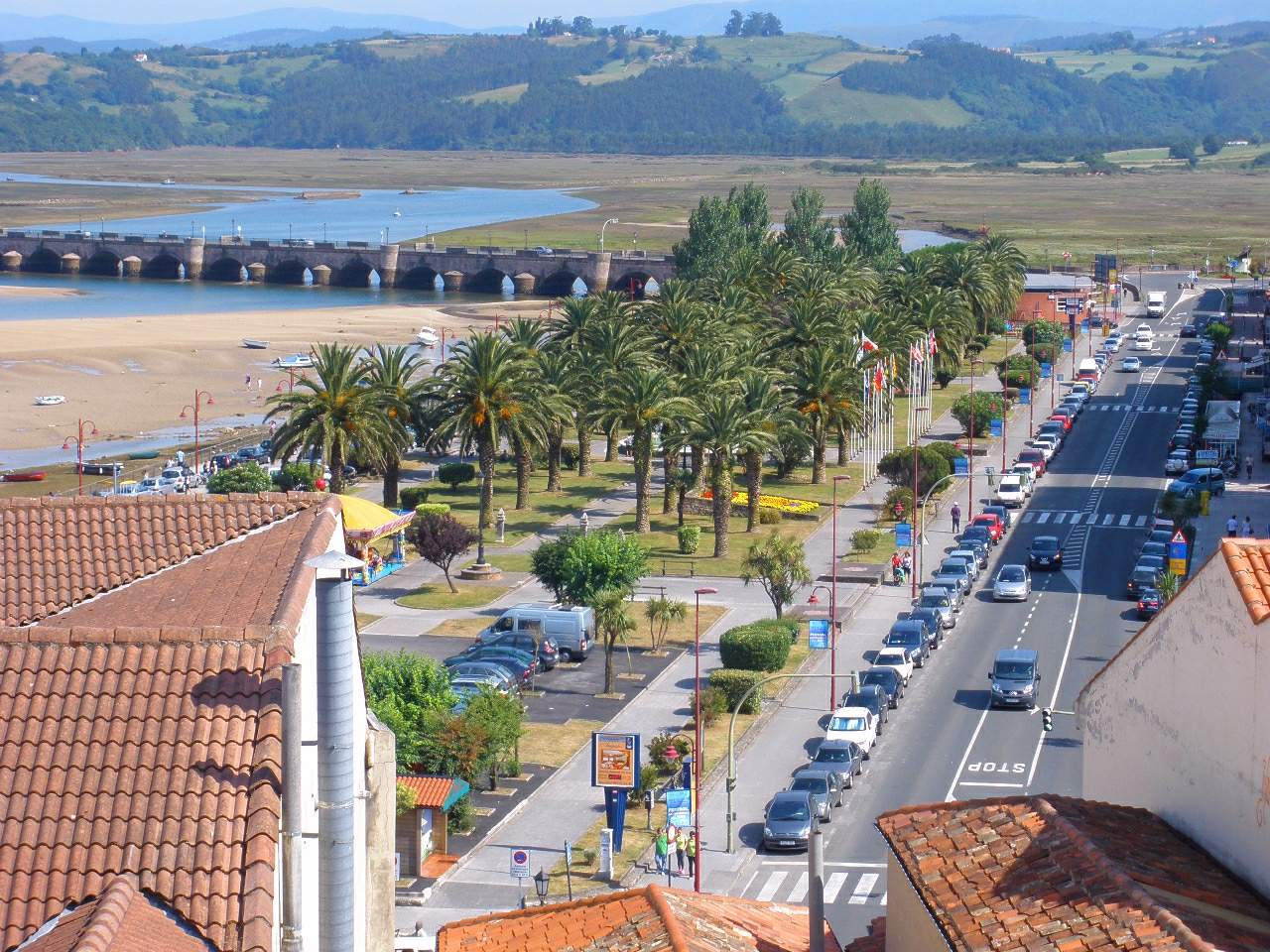 San Vicente de la Barquera (Cantabria) - Avenida de Miramar